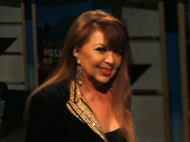 Olga Breeskin, vedette mexicana. Fotografía tomada en el estudio de Acceso Total de Telemundo 52, Los Ángeles.